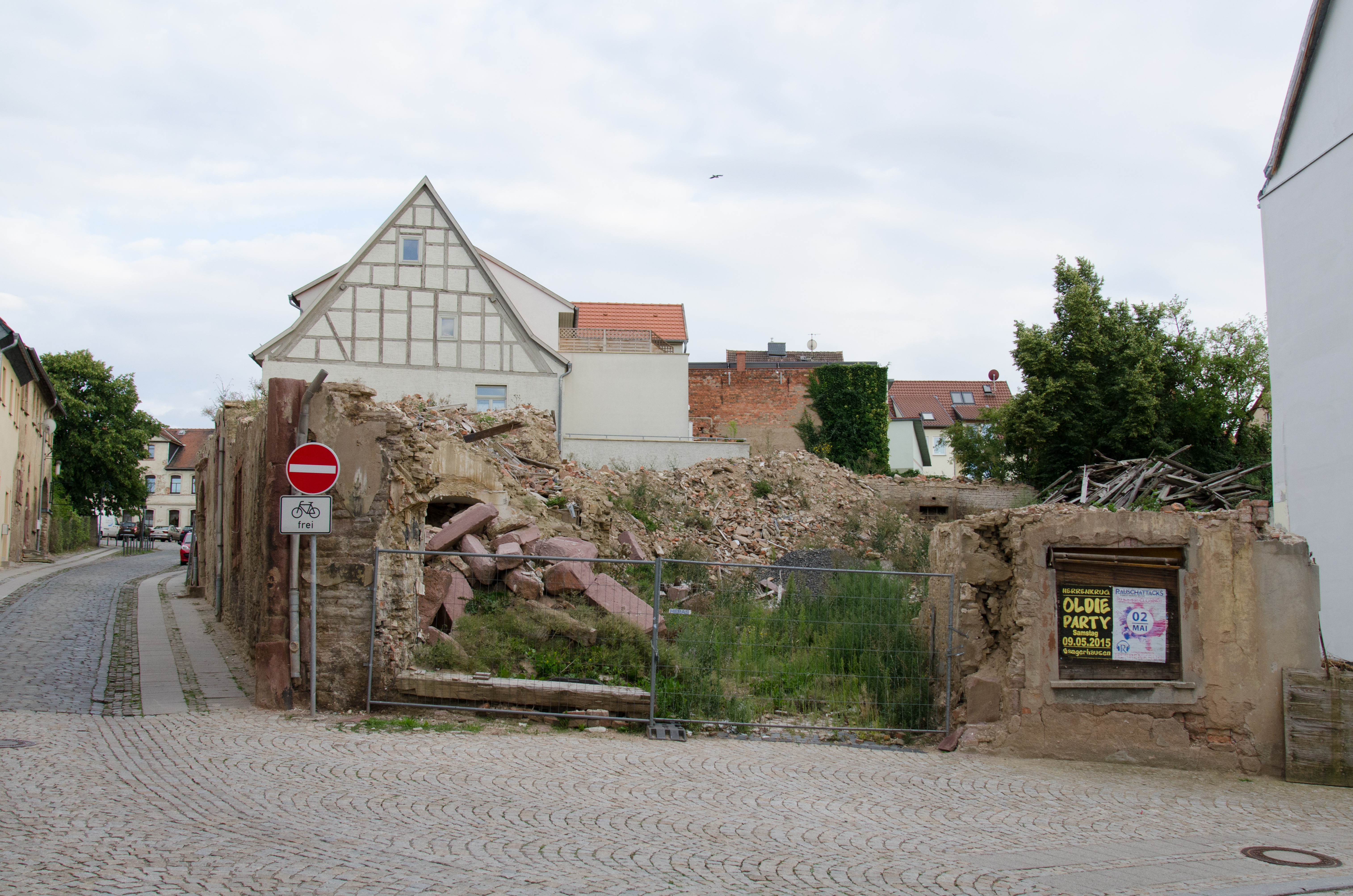 Sangerhausen, Ulrichstraße 20